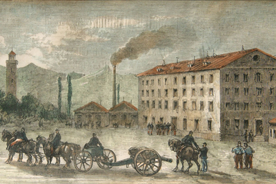 Photographie ancienne de l'arsenal de Tarbes